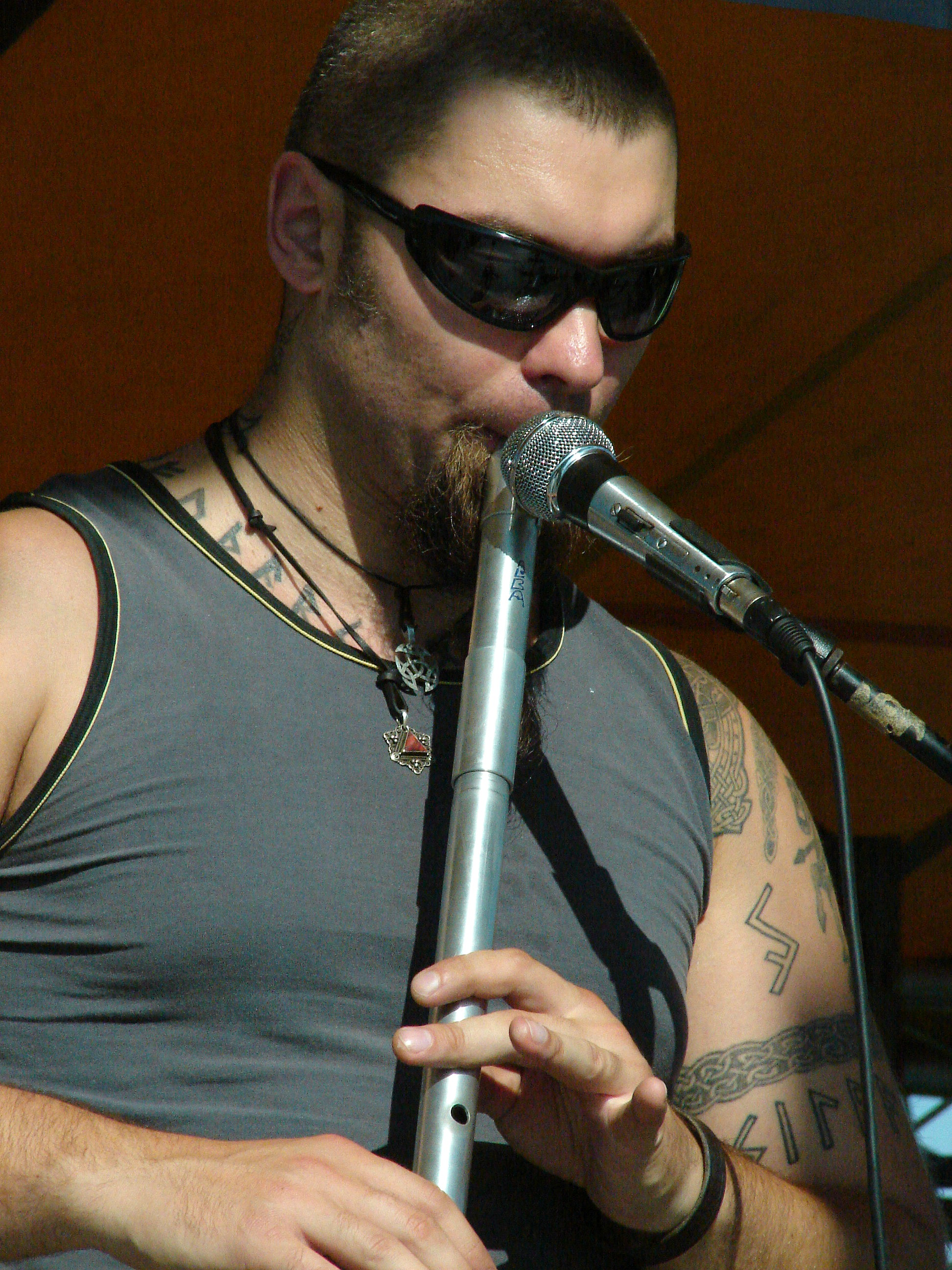 Marcin Rumiński podczas koncertu zespołu Shannon w Pyskowicach (Dybuk - Festiwal na kultur rozstajach)